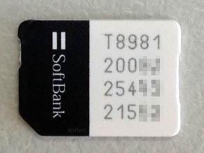 日本の、Softbank iPhone5用のUSIMカード。